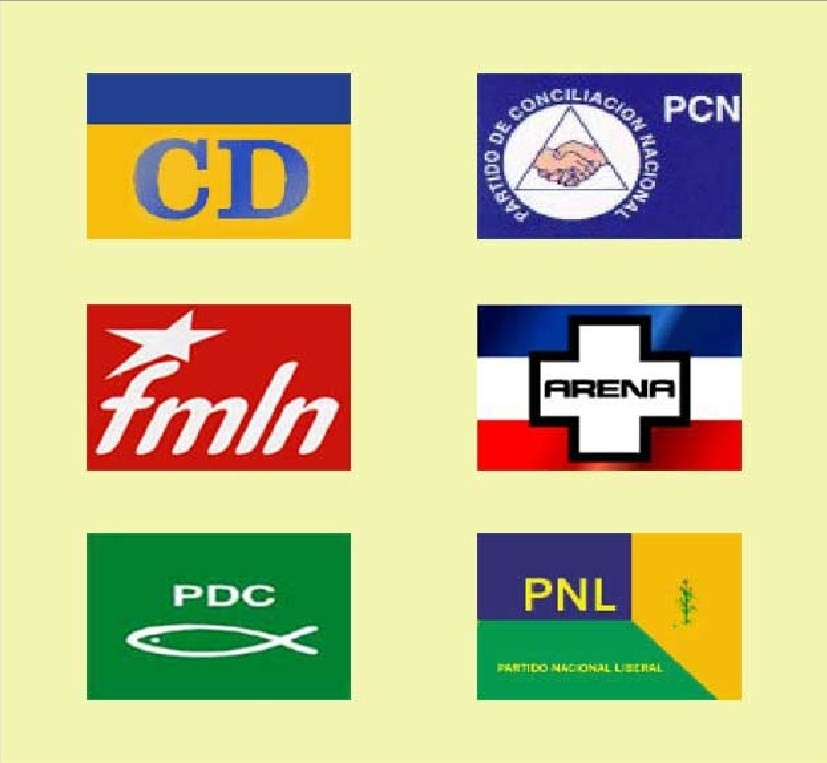 Disposición de los partidos políticos en una papeleta electoral del 2006